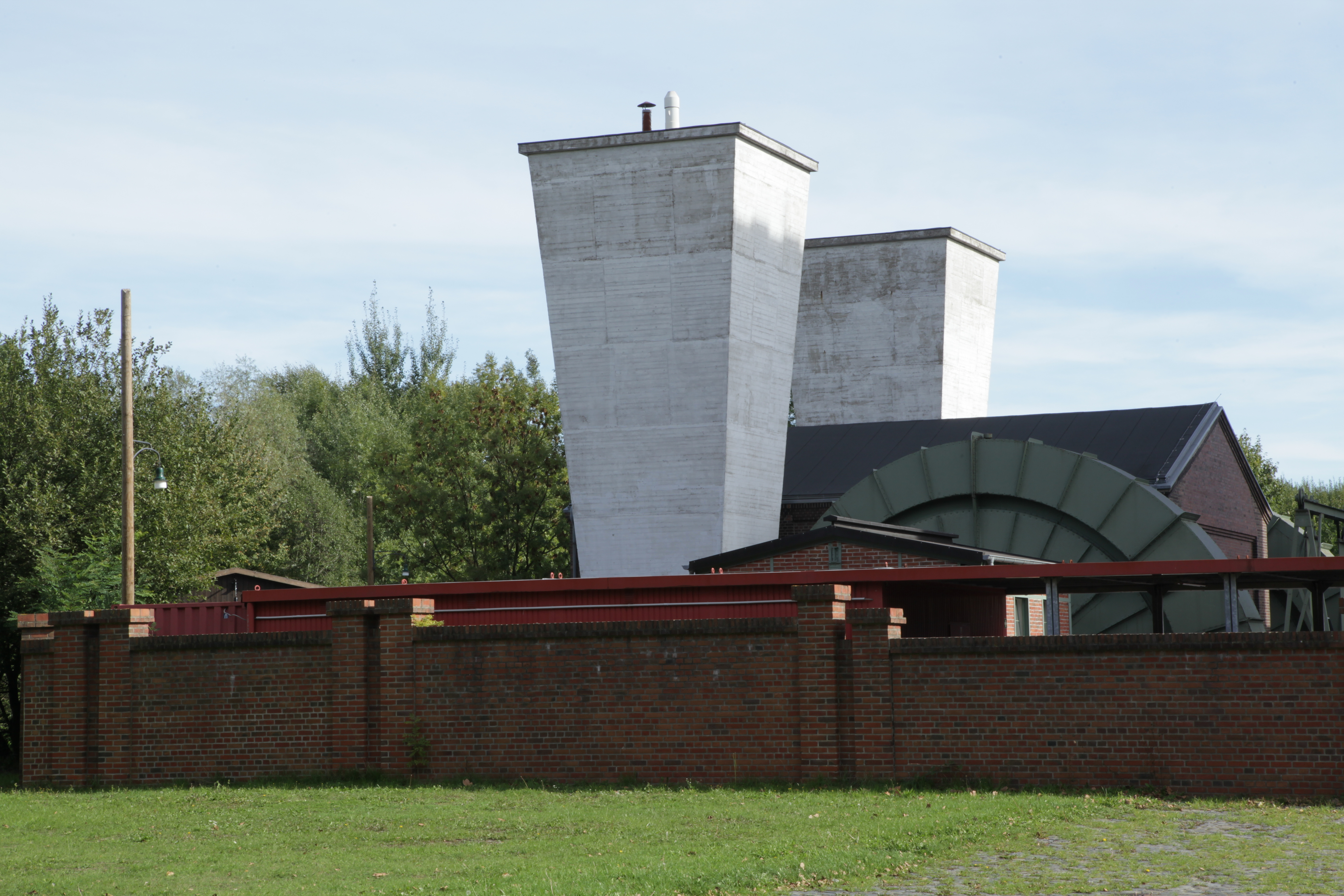 Lüftergebäude der Zeche Hannover, Günnigfelder Straße in Bochum